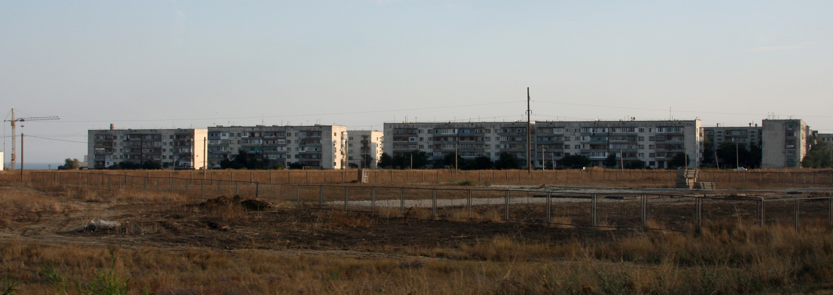 Вид на поселок Приморский в Крыму со стороны шоссе Феодосия-Керчь